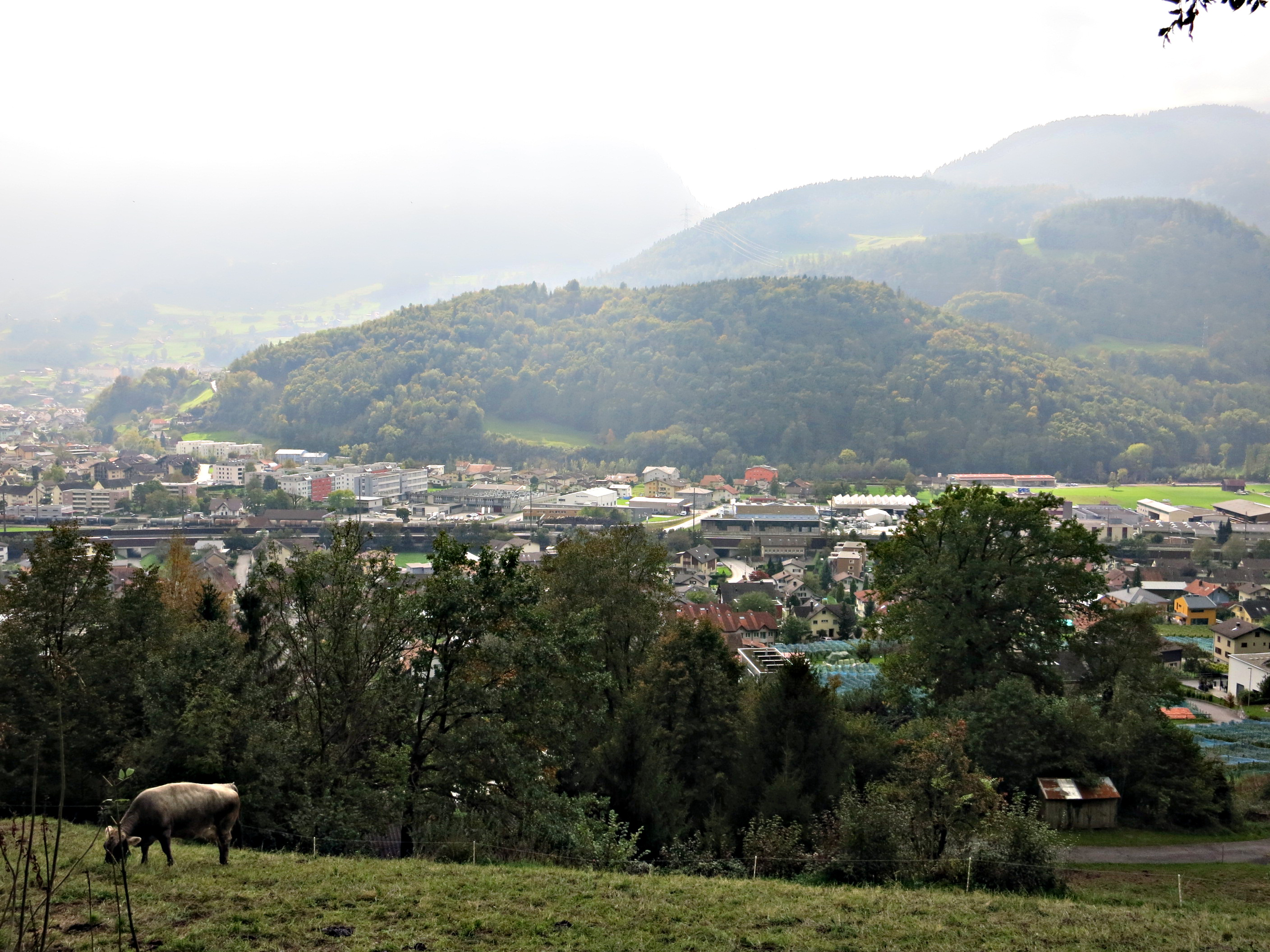 Höhensiedlung Castels, Mels SG, Schweiz